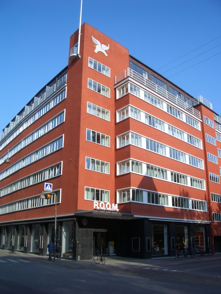 Hotel Skt. Petri in Copenhagen, Denmark